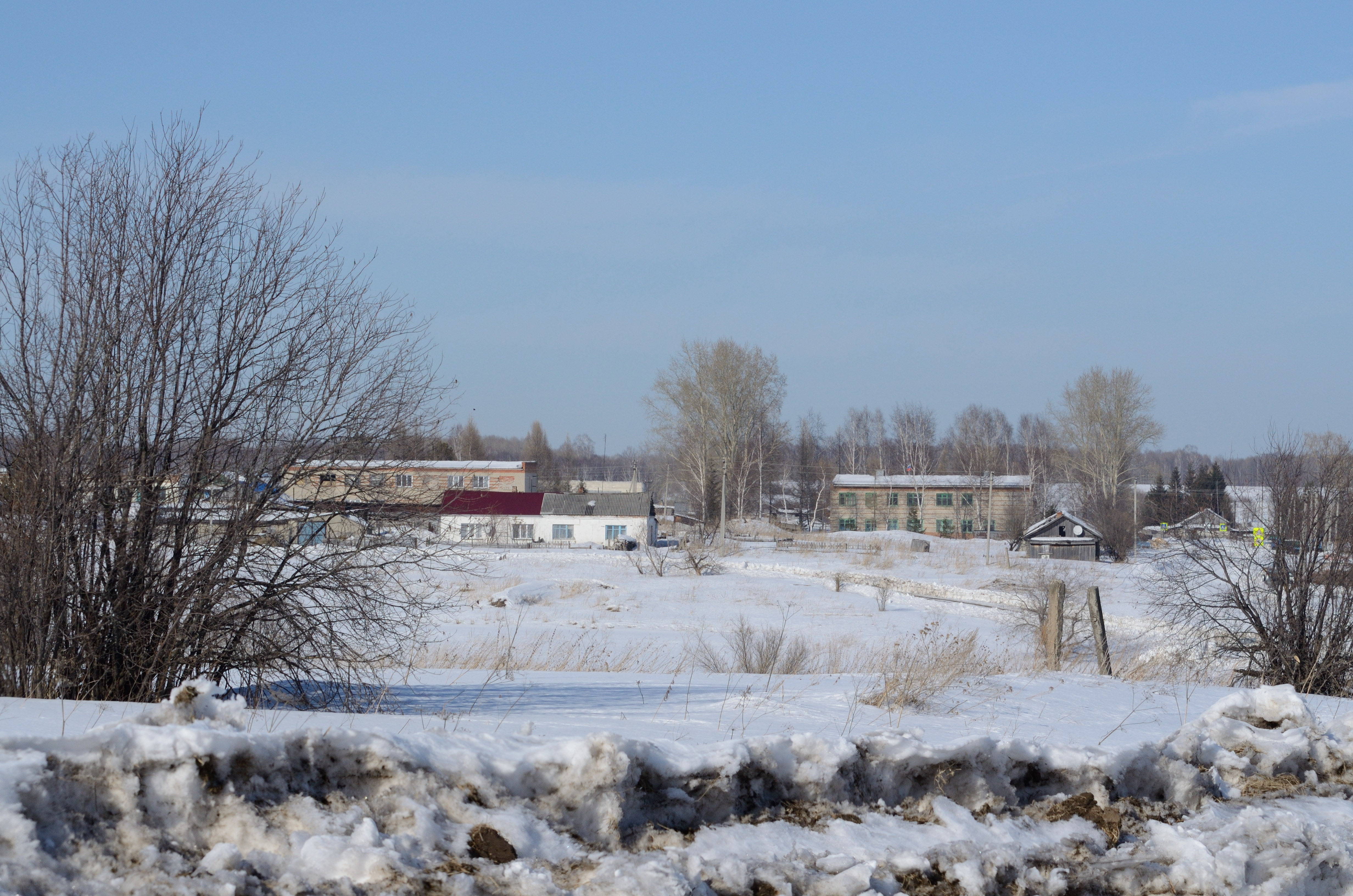 Фотография деревни Китерня